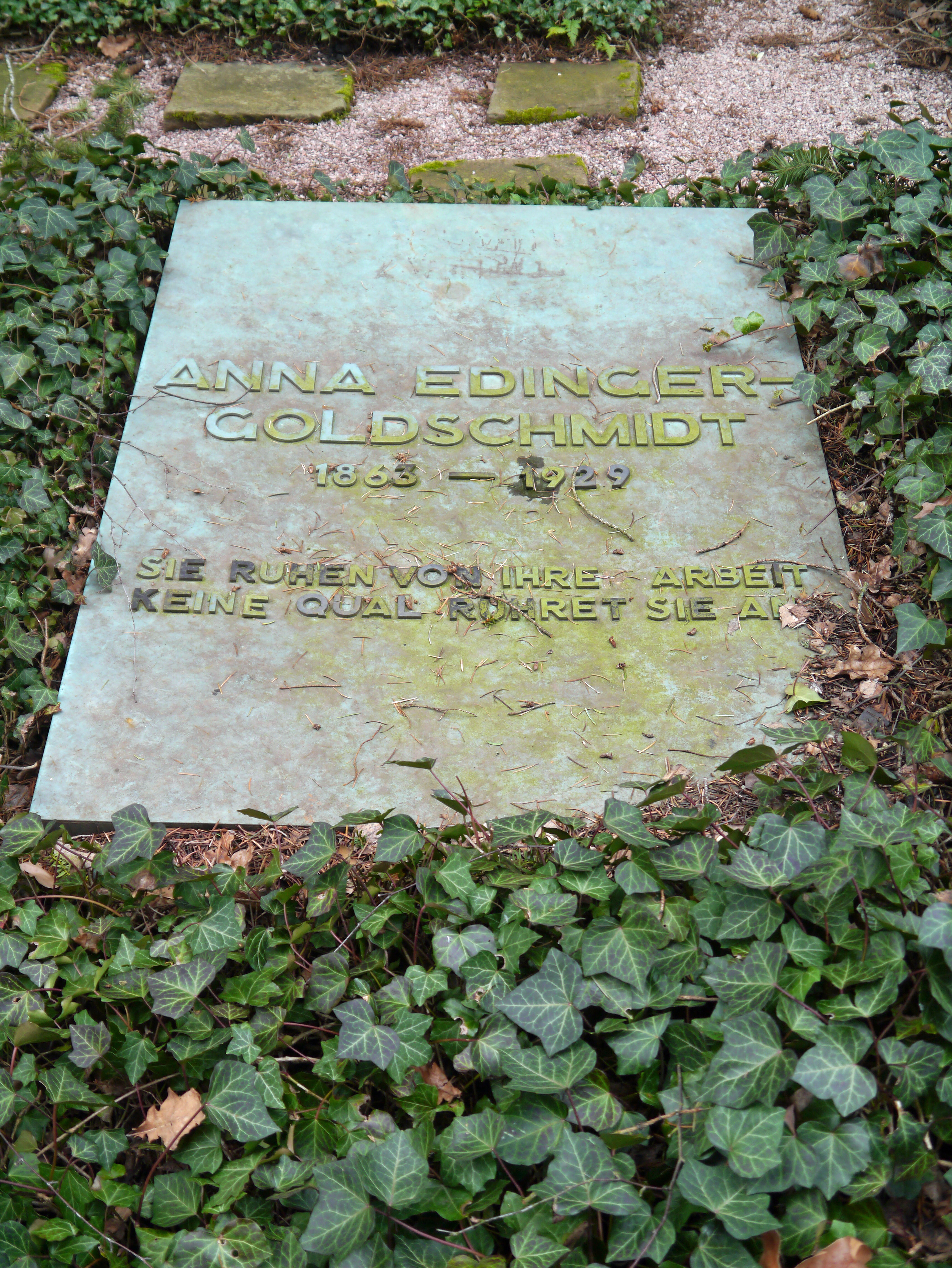 Grab von Anna Edinger-Goldschmidt auf dem Frankfurter Hauptfriedhof.